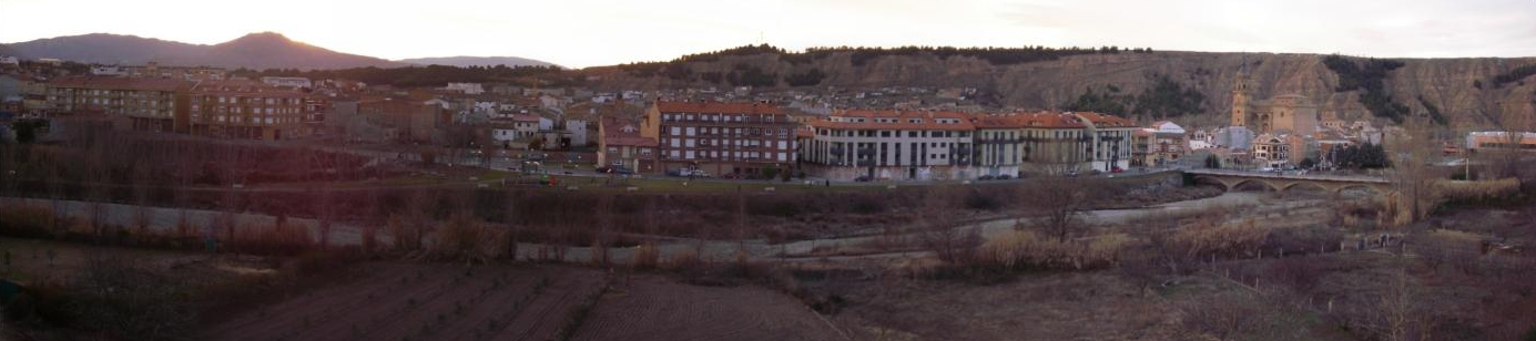 General view of Murillo de Río Leza (La Rioja, Spain)